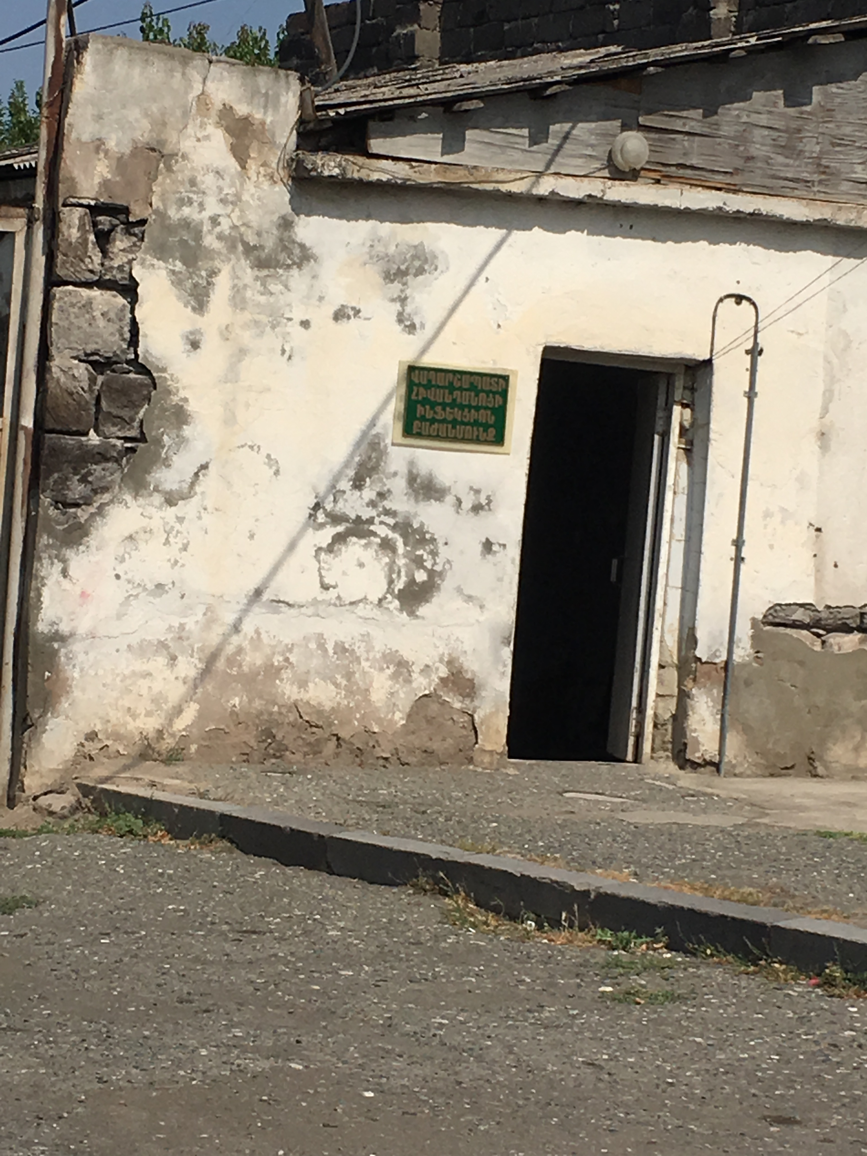 Վաղարշապատի հիվանդանոցի ինֆեկցիոն բաժանմունք